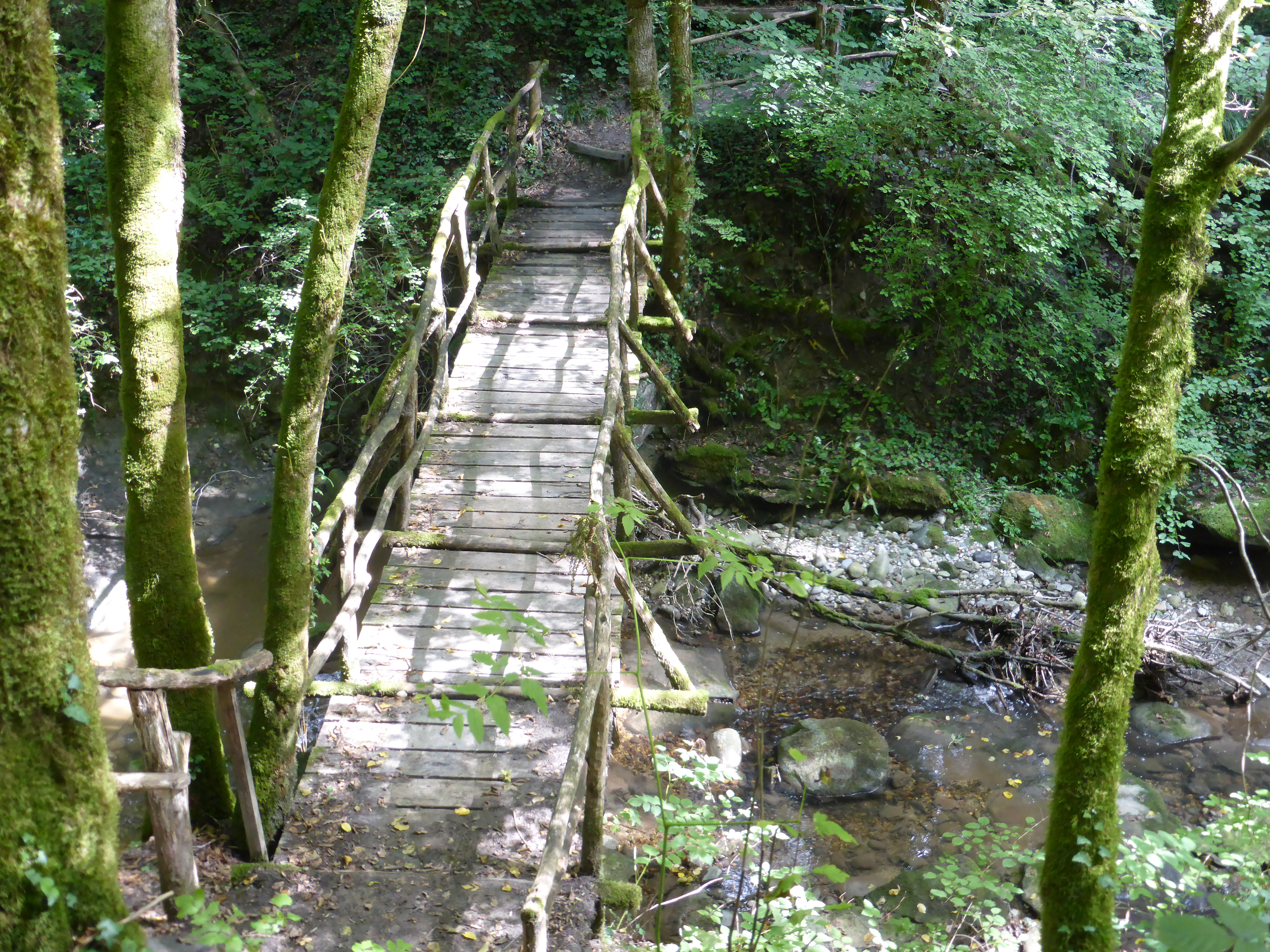 Passerelle sur la rivière Roulave